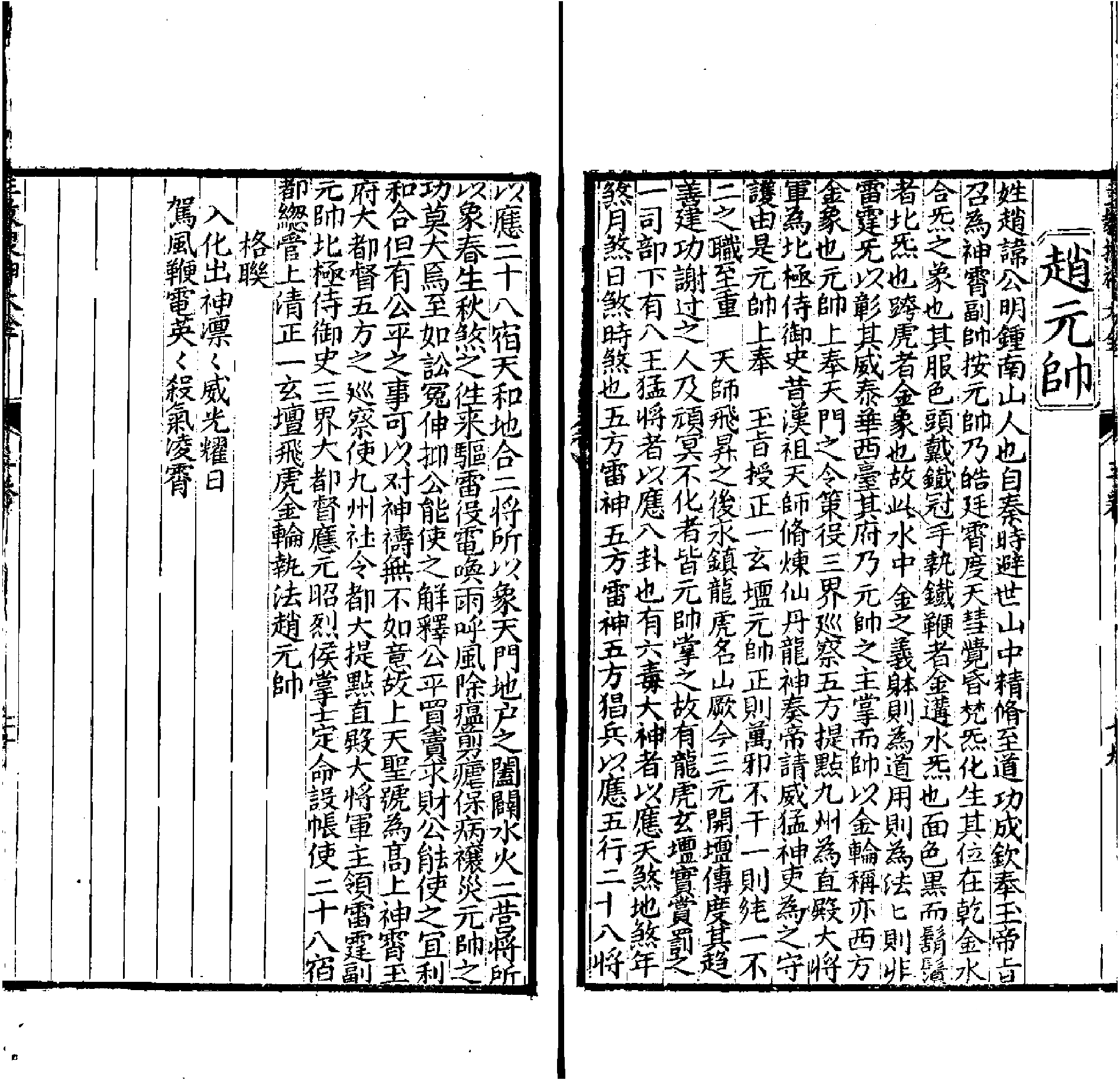 三教源流搜神大全趙公明簡介